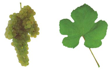 Traube und Blatt der Weißweinsorte 'Loureiro'